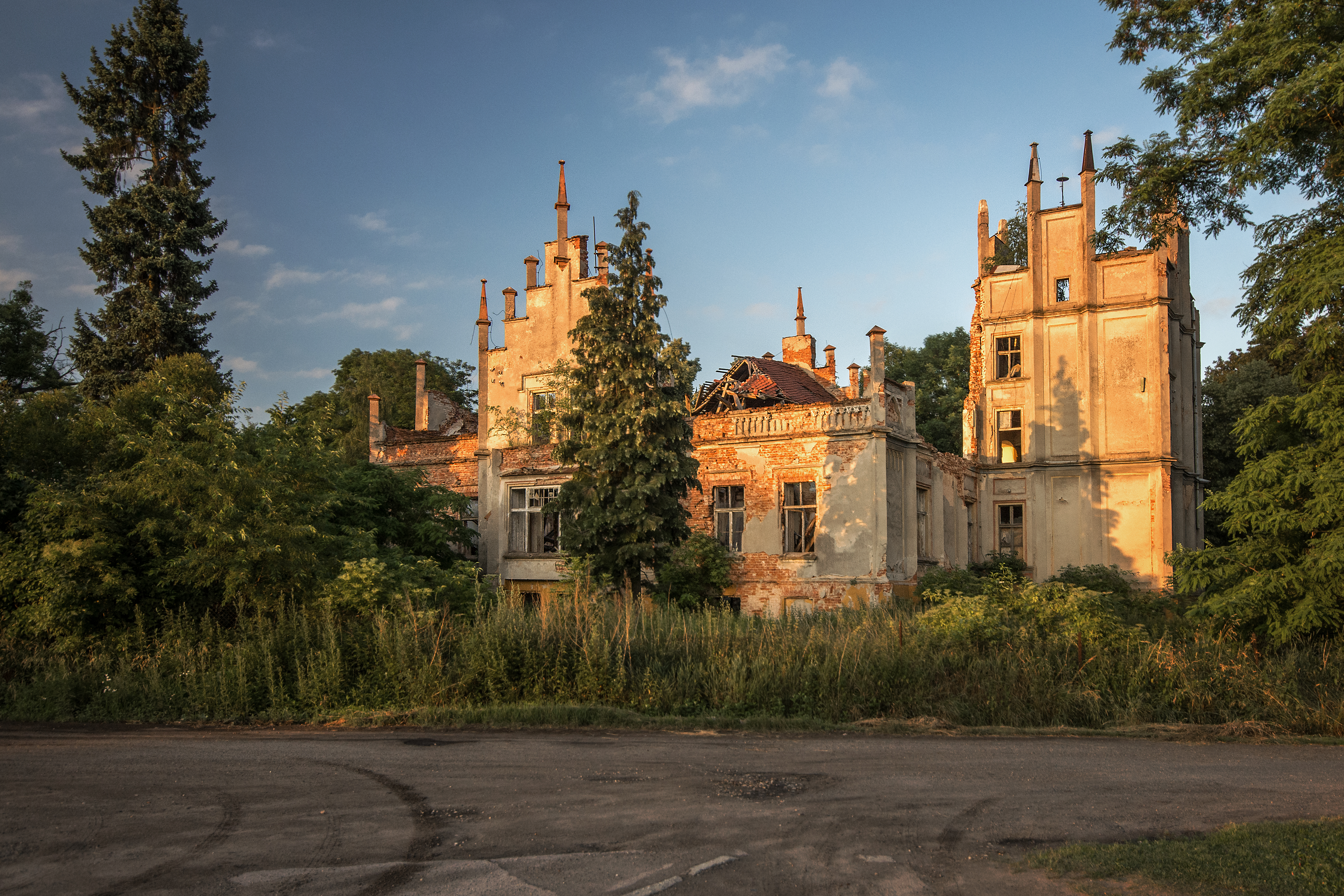 Rożnów, dwór, 1 poł. XIX